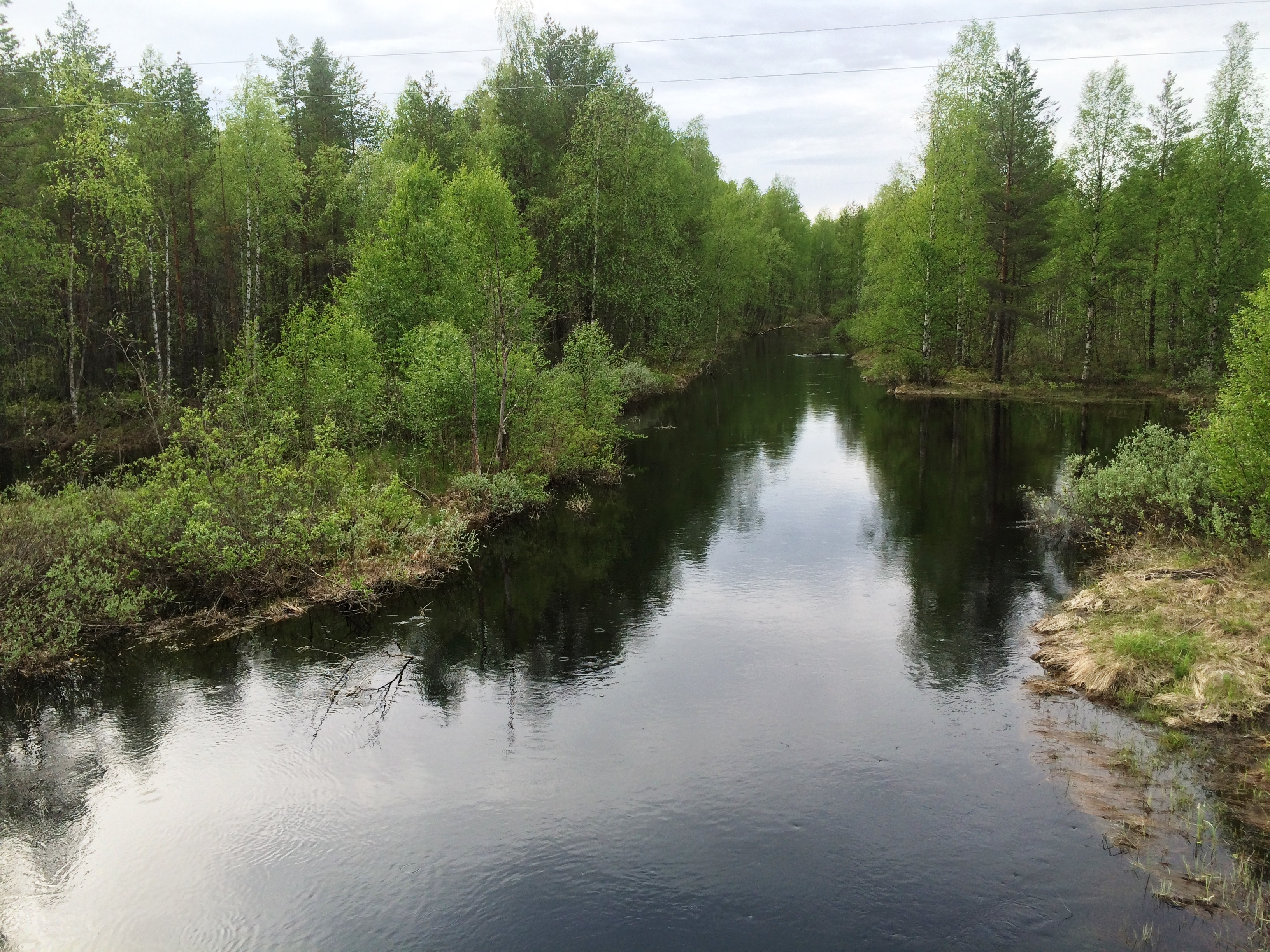 река Хедь